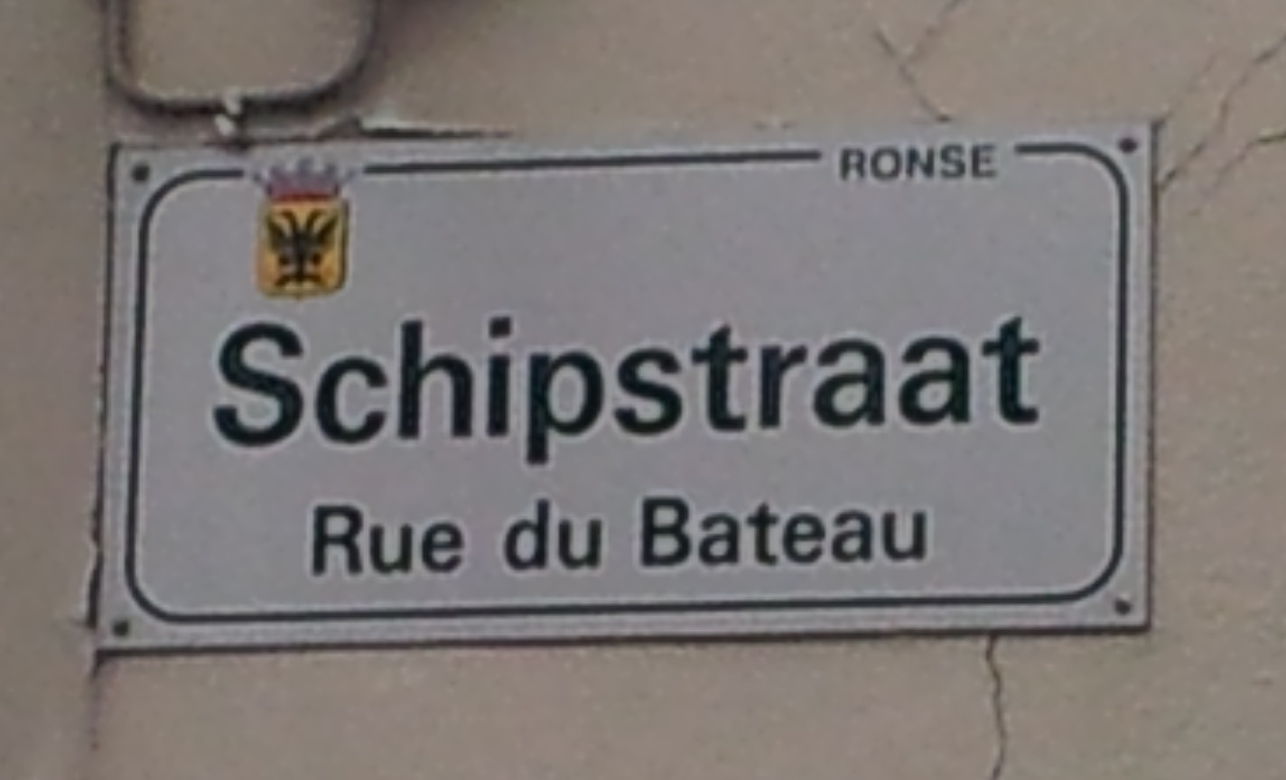 Signalisation bilingue en Belgique (Ronse, Flandre Orientale)